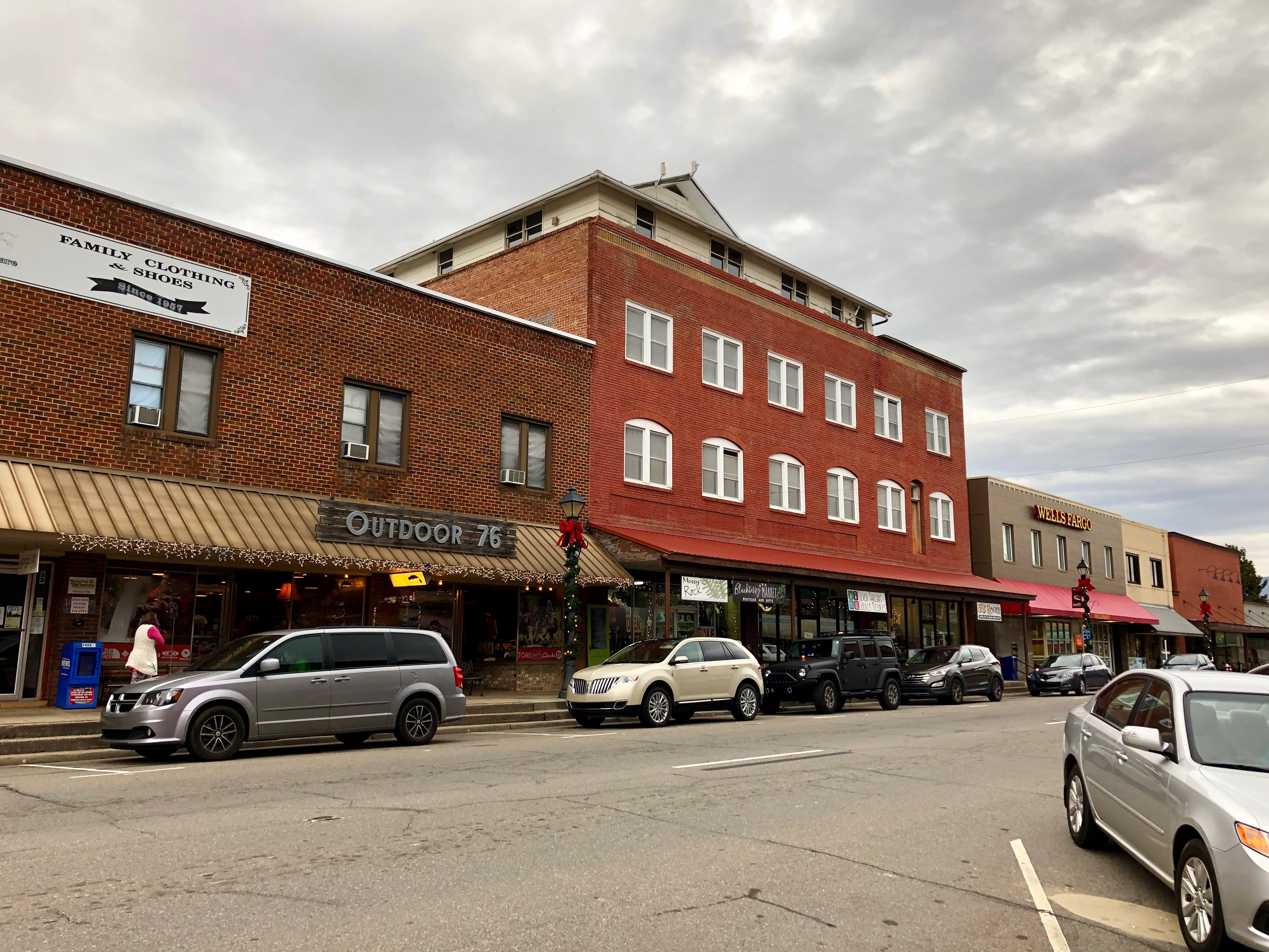 Main Street, Franklin, NC